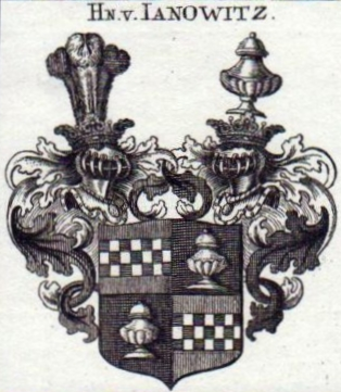 Wappen der Herren von Janowitz ab 1653. Friedrich Ludwig von Janowitz (1618–1673), letzter der württembergischen Linie des Geschlechts derer von Janowsky, nahm das Wappen 1653 nach dem Erwerb des Erbschenkenamts des Herzogtums Württemberg an. Das viergeteilte Wappen enthält in 2 Feldern das Stammwappen derer von Janowsky (→ File:Janowitz-Wappen, 16. Jahrhundert.jpg) und in den 2 anderen Feldern je einen goldenen Deckelbecher. Links: gekrönter Helm des Stammwappens, rechts: gekrönter Helm mit Deckelkanne.